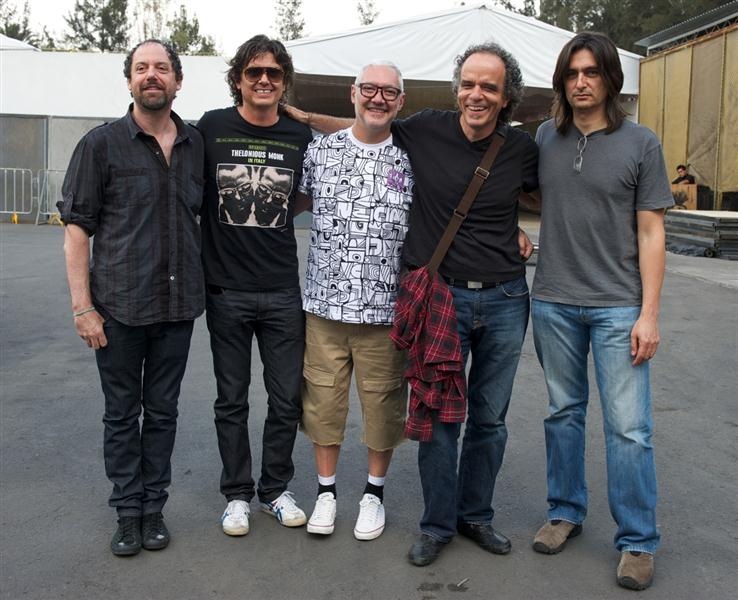 Caifanes durante los ensayos antes del Vive Latino 2011.